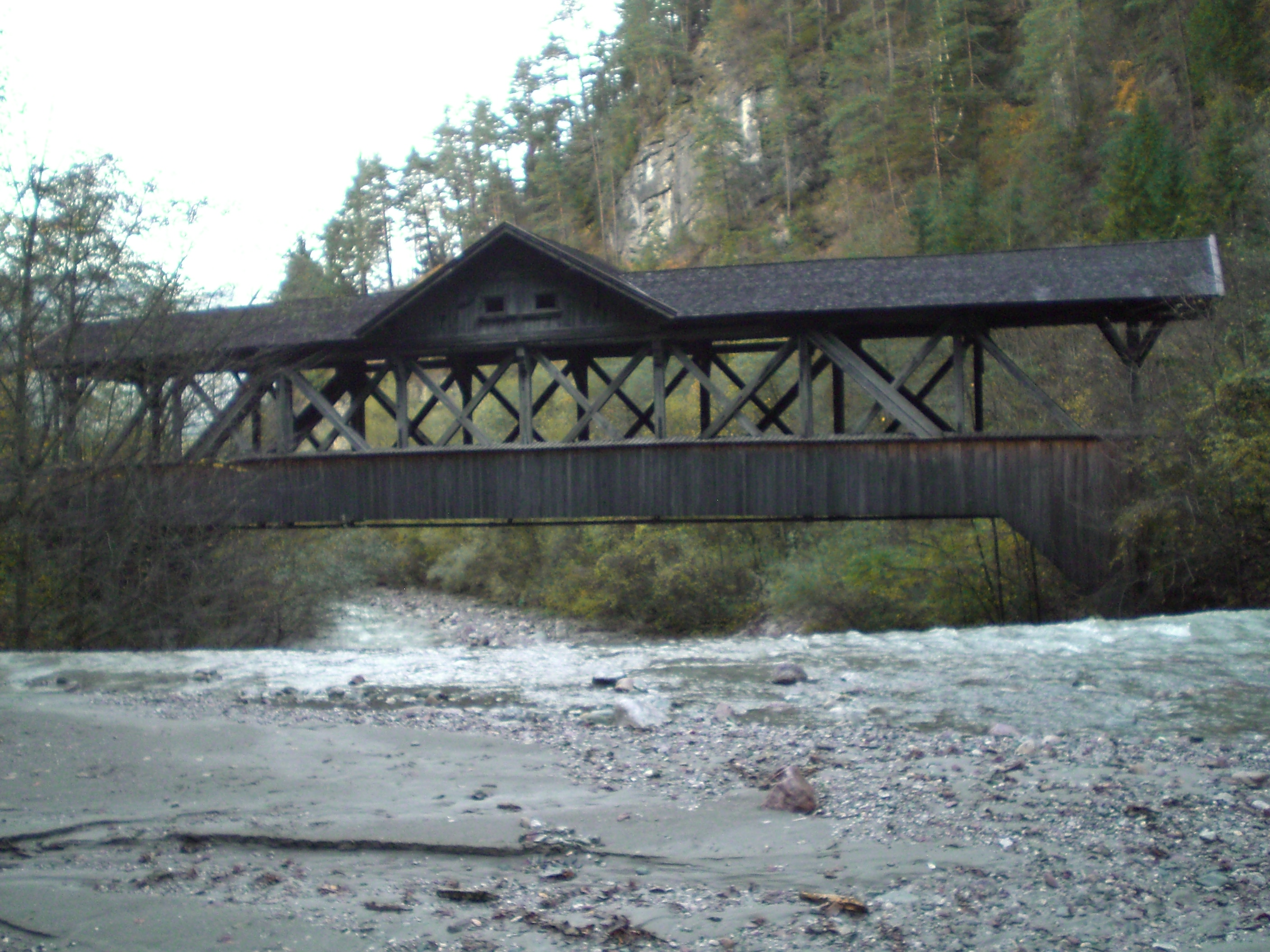 Kundler Klamm-Brücke